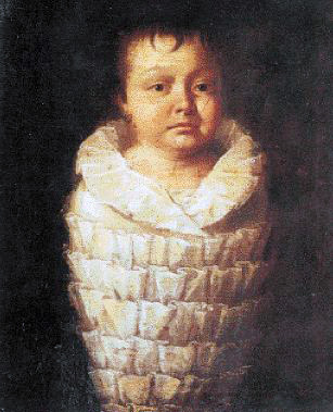 Dionysios Solomos as a baby